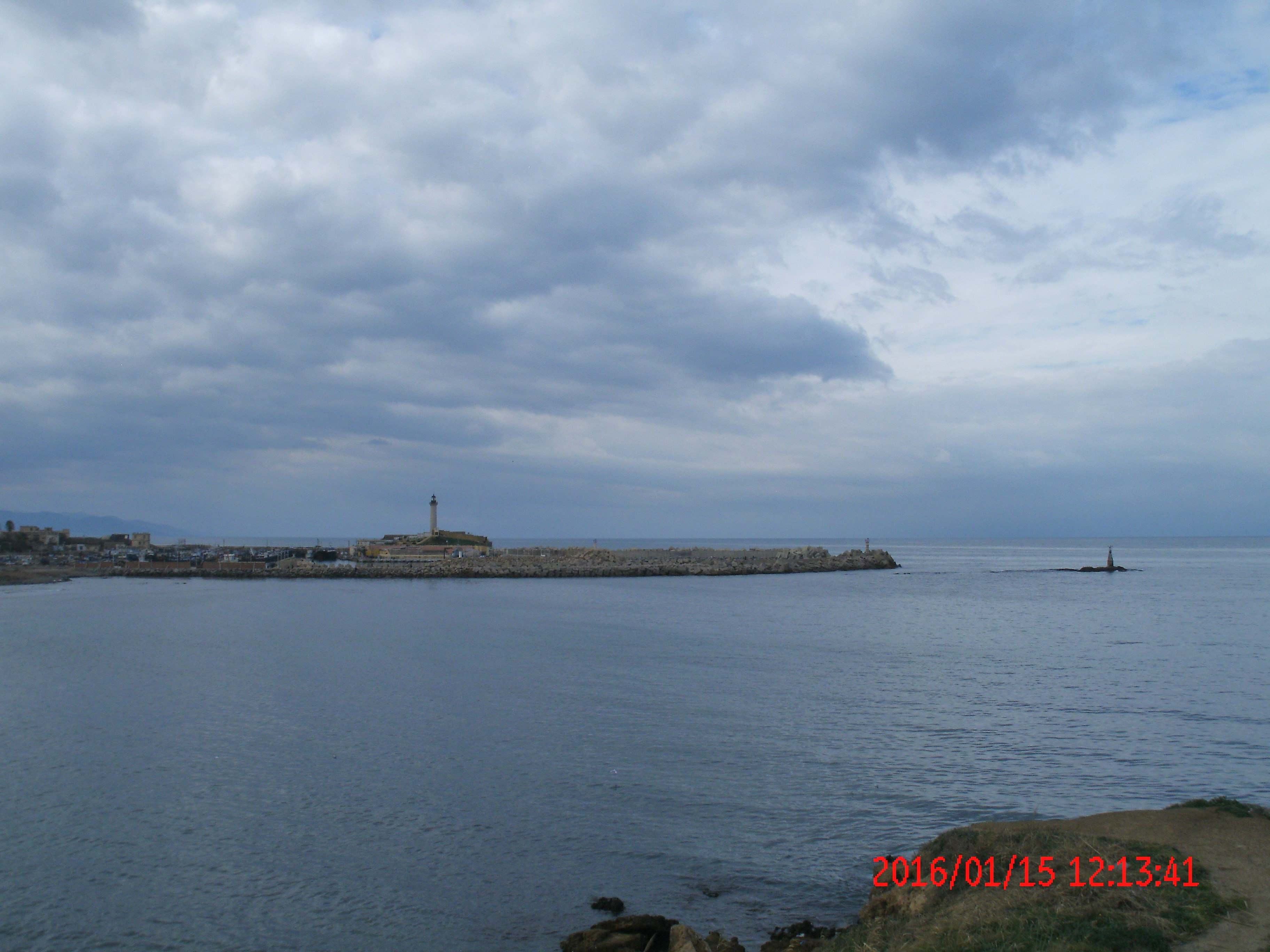 Le port de Cherchell